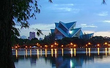 Istana Budaya photo taken at night